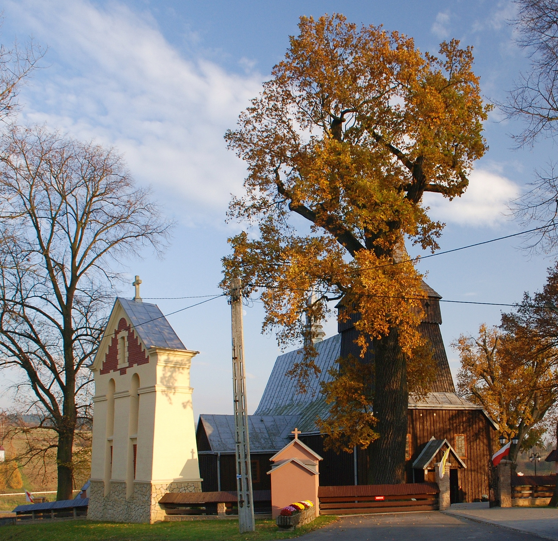 kościół